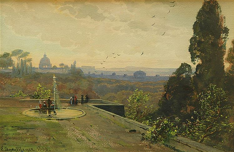 Blick auf Rom